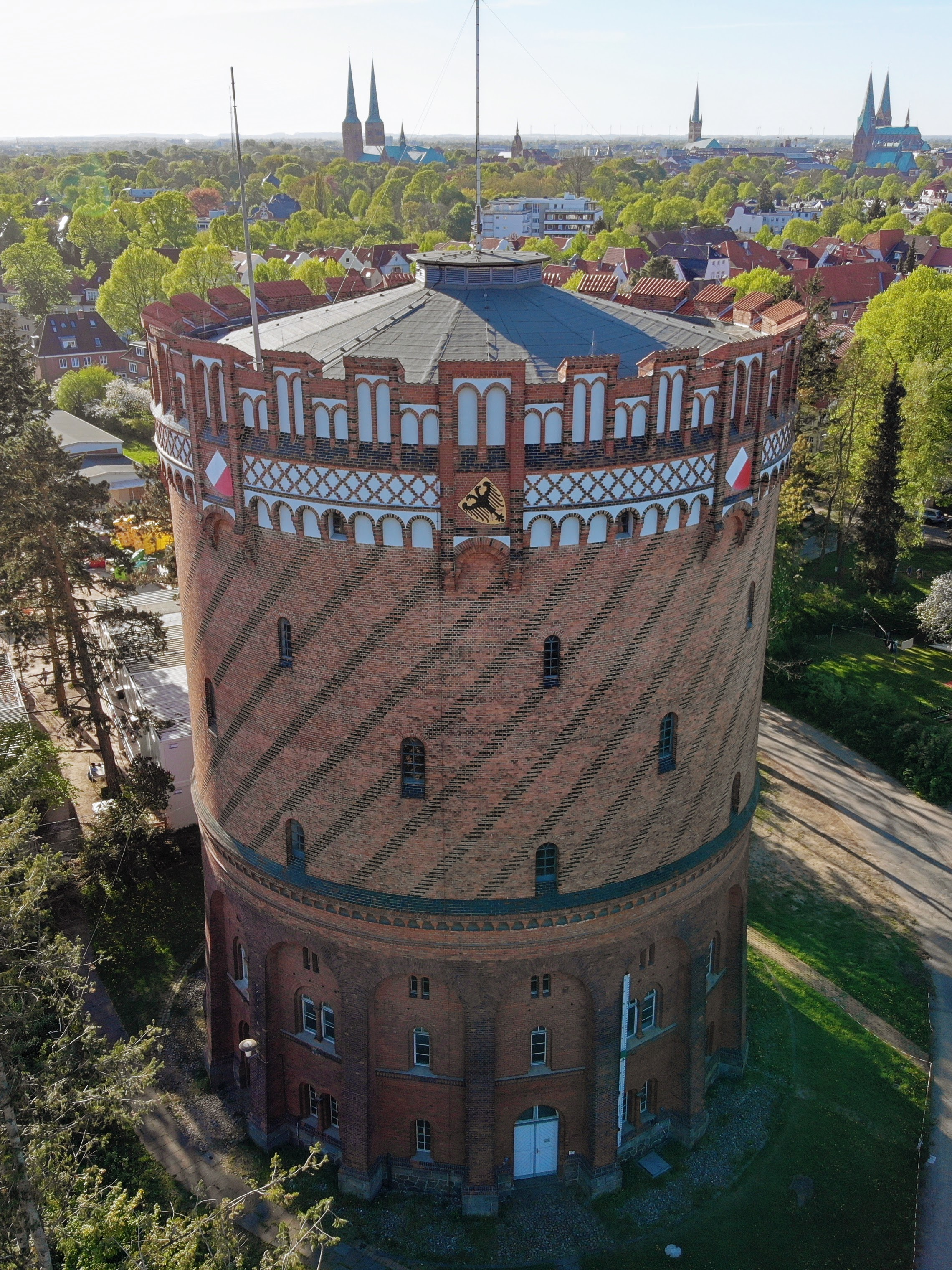 Lübeck (Schleswig-Holstein), Wasserturm: Wasserkunst Lübeck, Foto 2018